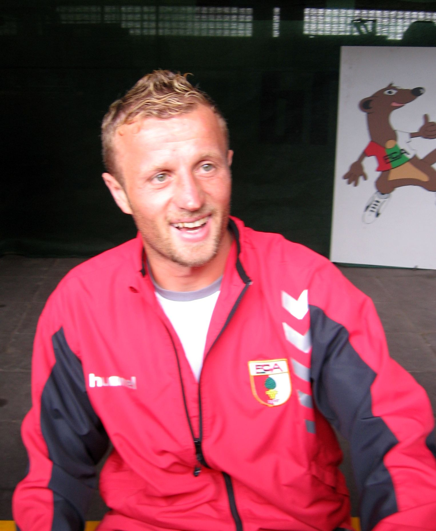 Torsten Traub